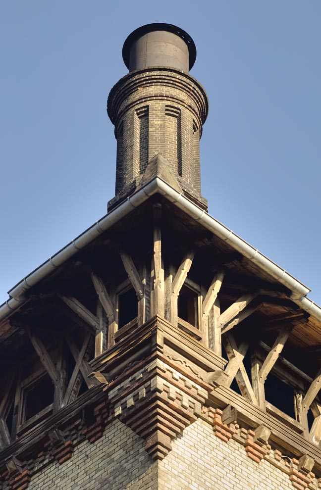 Berlin-Pankow, Mühlenstr. 9-11, Mälzerei: Fachwerk-Dachgeschoss am östlichen Darrengebäude.